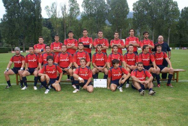 Équipe de rugby d'Espagne.